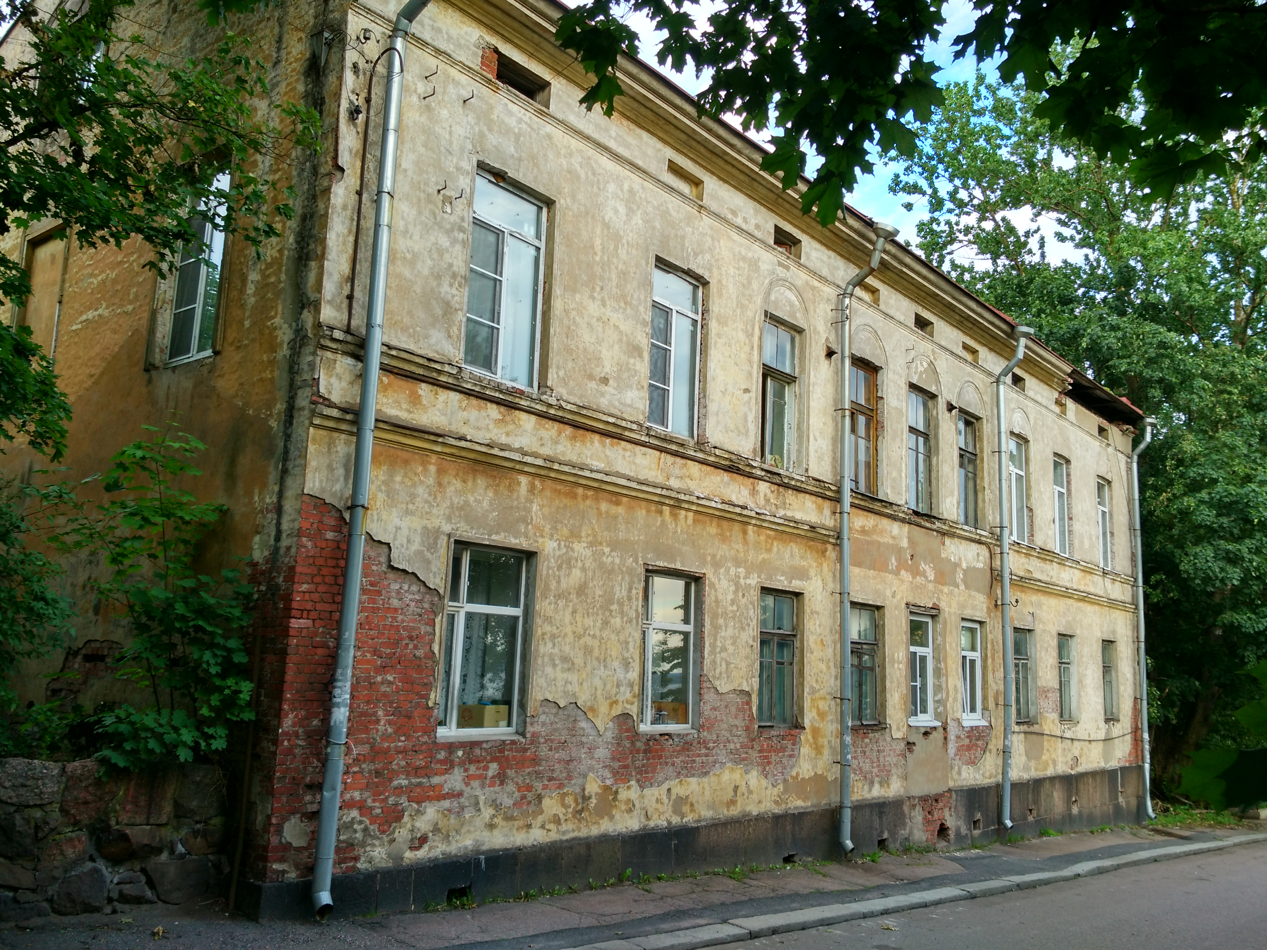 Жилой дом: Выборгская улица, 13 / Косой переулок, Выборг, Выборгский район, Ленинградская область